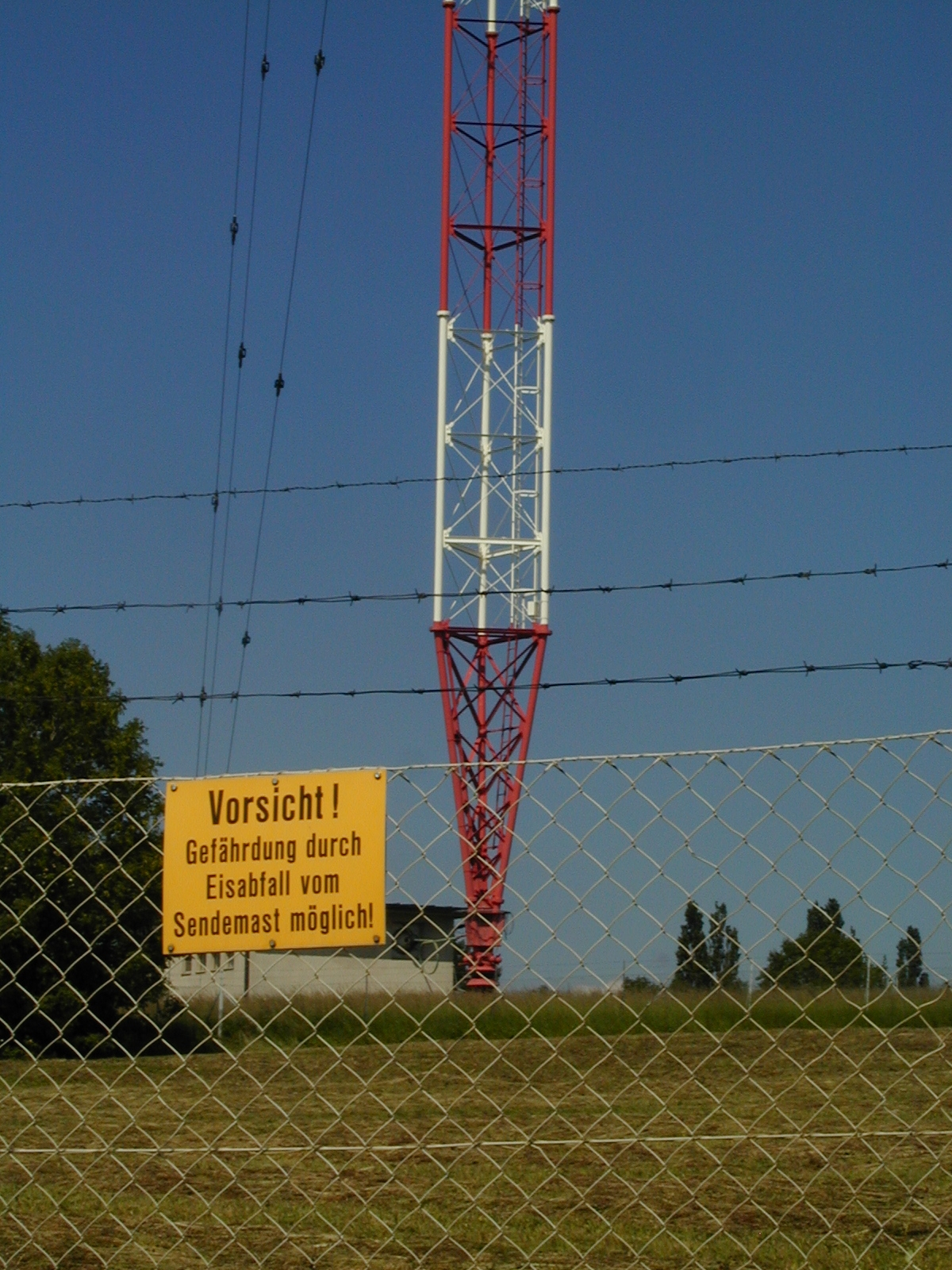 Sendeanlage Bisamberg bei Wien. Mastfuss Nordmast (265m).